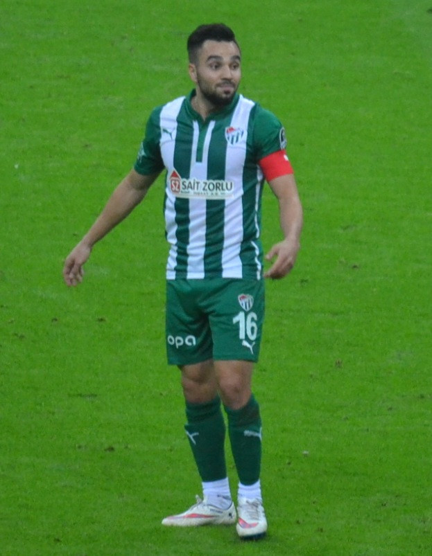 Volkan Şen 2015